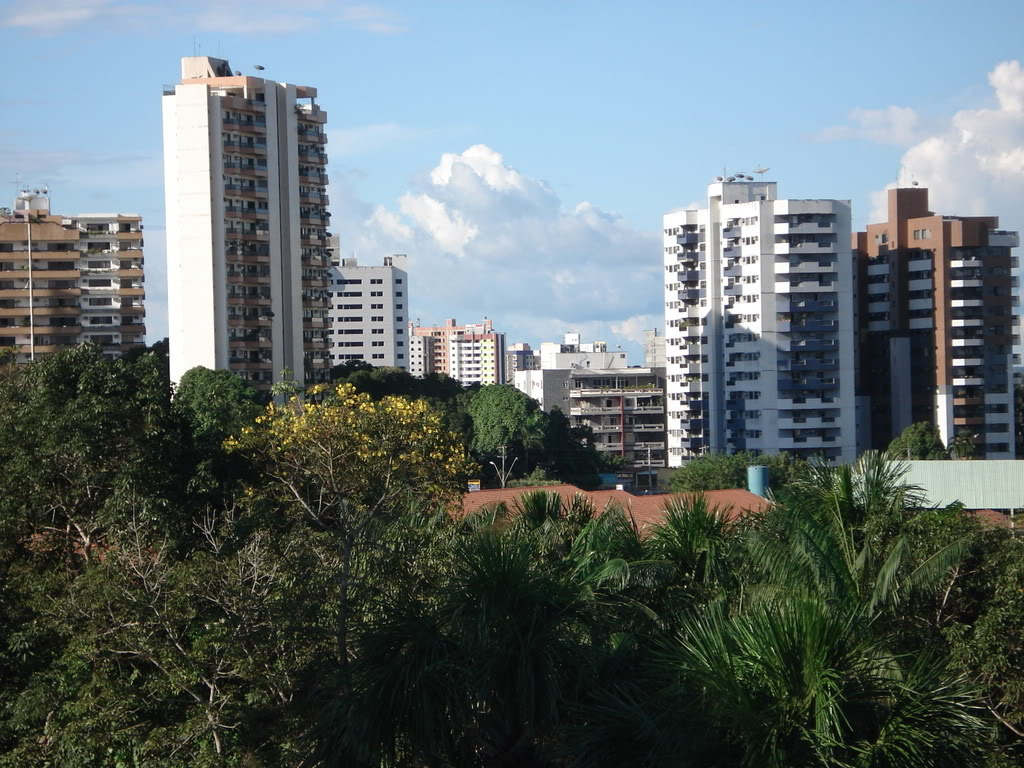 Manaus, Amazonas, Brazil